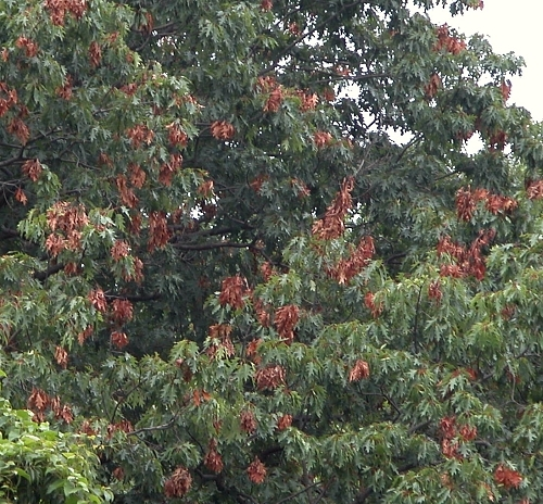 Damage of Magicicada septendecim, 17-year-periodical cicada, 17-Jahr-Zikade, Baltimore, USA